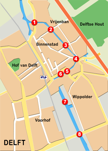 Location of bridges in Delft, Holland. Legend: 1 Reineveldbrug, 2. Plantagebrug, 3. Koepoortbrug, 4. Oostpoortbrug, 5. St. Sebastiaansbrug, 6. Hambrug, 7. Abtwoudsebrug, 8. Kruithuisbrug Image is my own work.